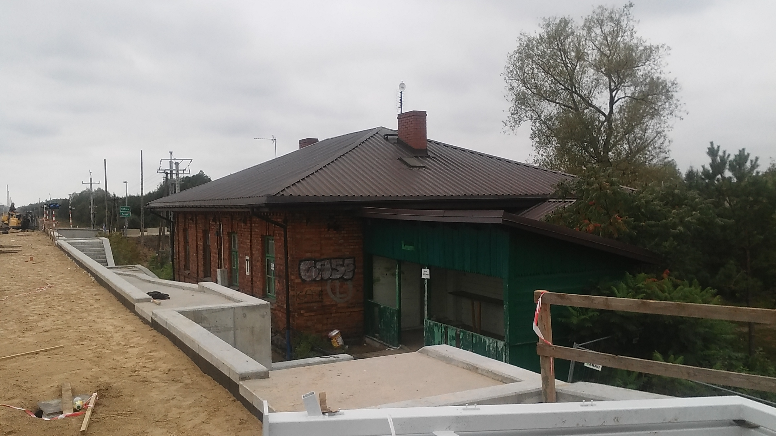 przystanek kolejowy Prostyń w czasie modernizacji linii kolejowej nr 6 - odbudowa peronu 2 i nieczynna kasa biletowa